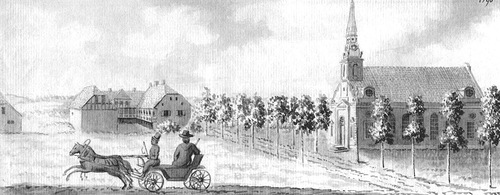 J. C. Brotze joonistus Suntselist 1790. Vaade lõunast, vasakul mõisahoone ja paremal luteri kirik.